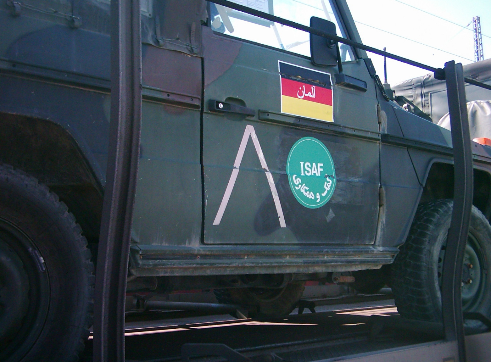 Bundeswehrfahrzeug für den ISAF-Einsatz. Mercedes G-Modell. Auf der Flagge steht "Deutschland" auf Darī.